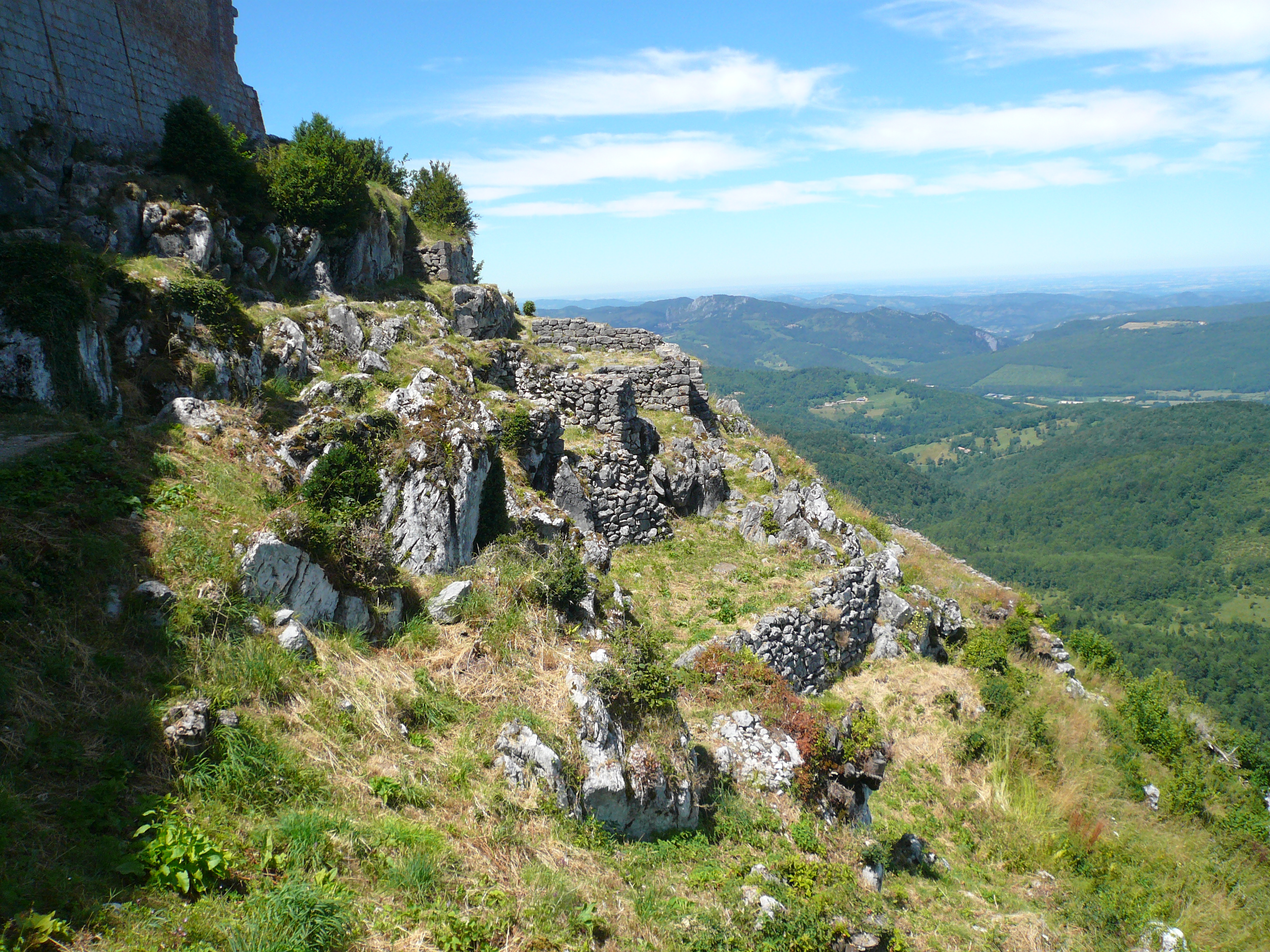 Vestiges du village cathare au pied du rempart nord du château de Montségur (Ariège, Midi-Pyrénées, France). .